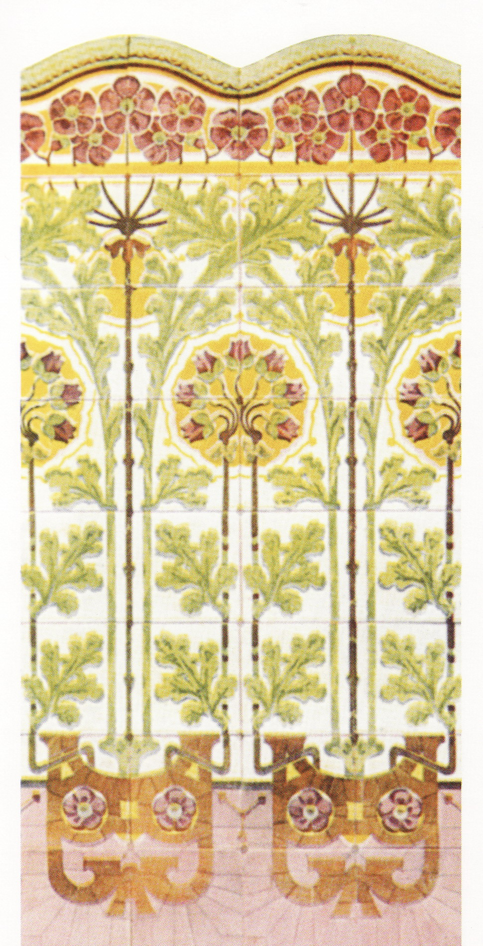 Disseny d'arrambador ceràmic per al catàleg de la fàbrica Pujol i Bausis. 1906. Obra de Lluís Bru i Salelles